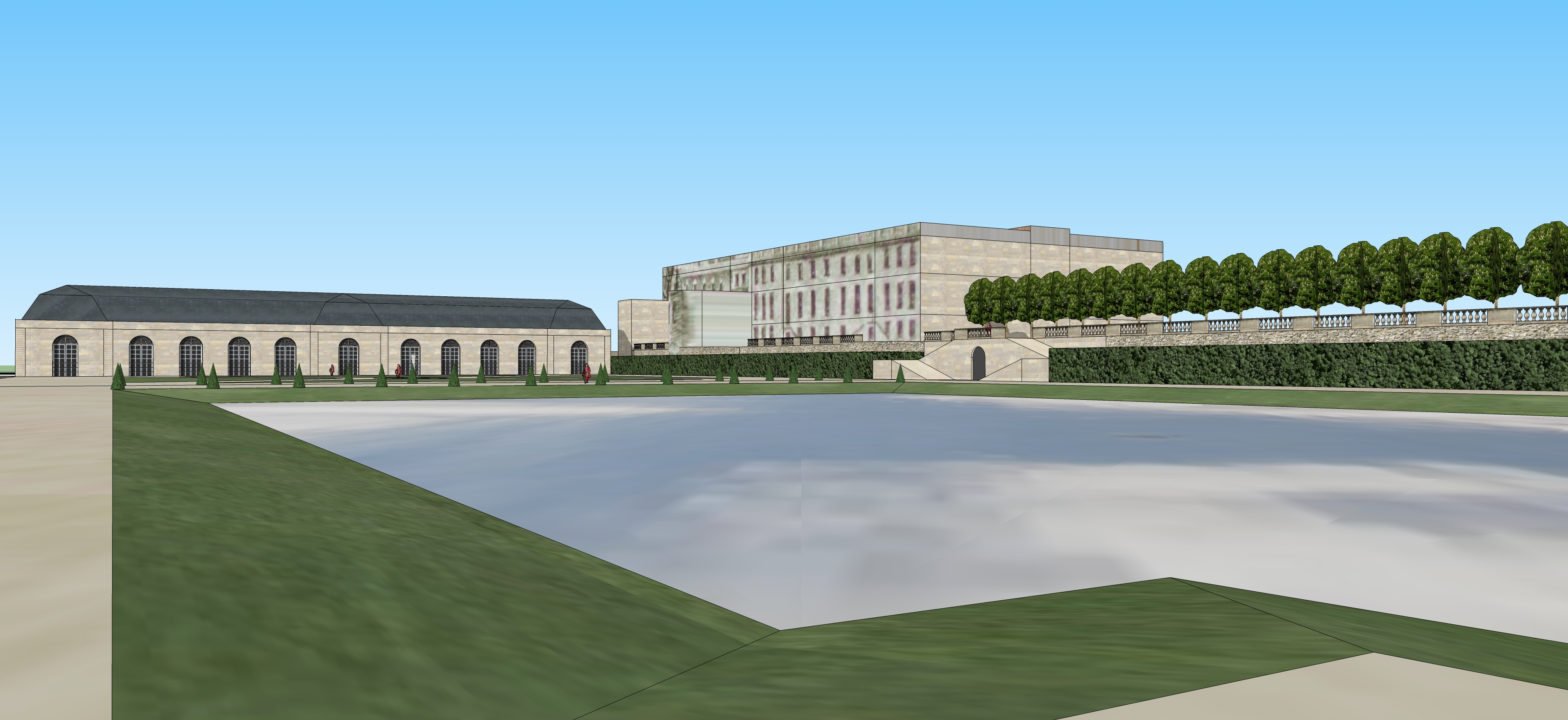 Vue des jardins du château de Jouy, avec l'Orangerie, milieu du XVIIIe siècle